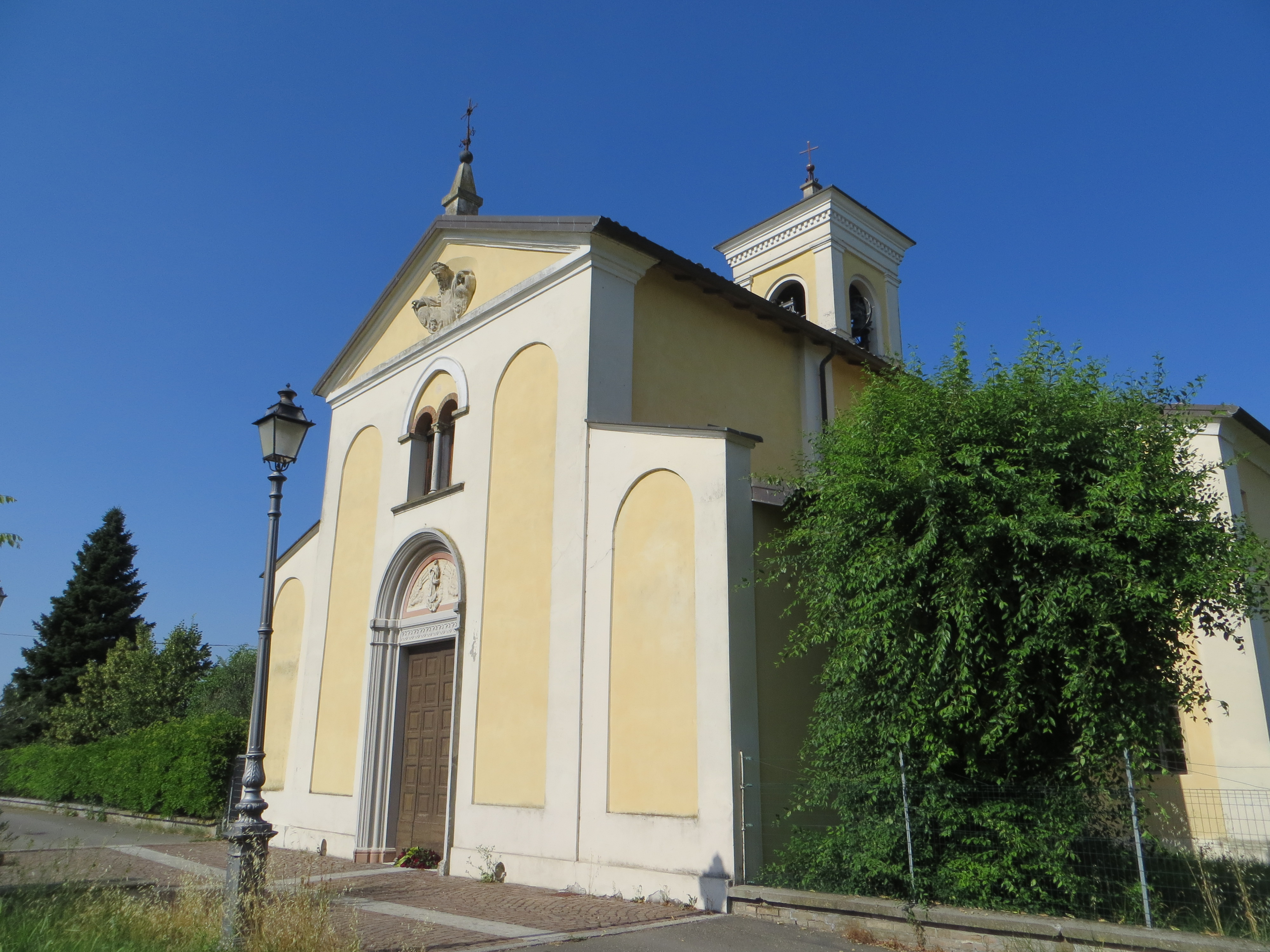 Chiesa dell'Assunzione di Maria Vergine (Valera, Parma) - facciata e lato sud